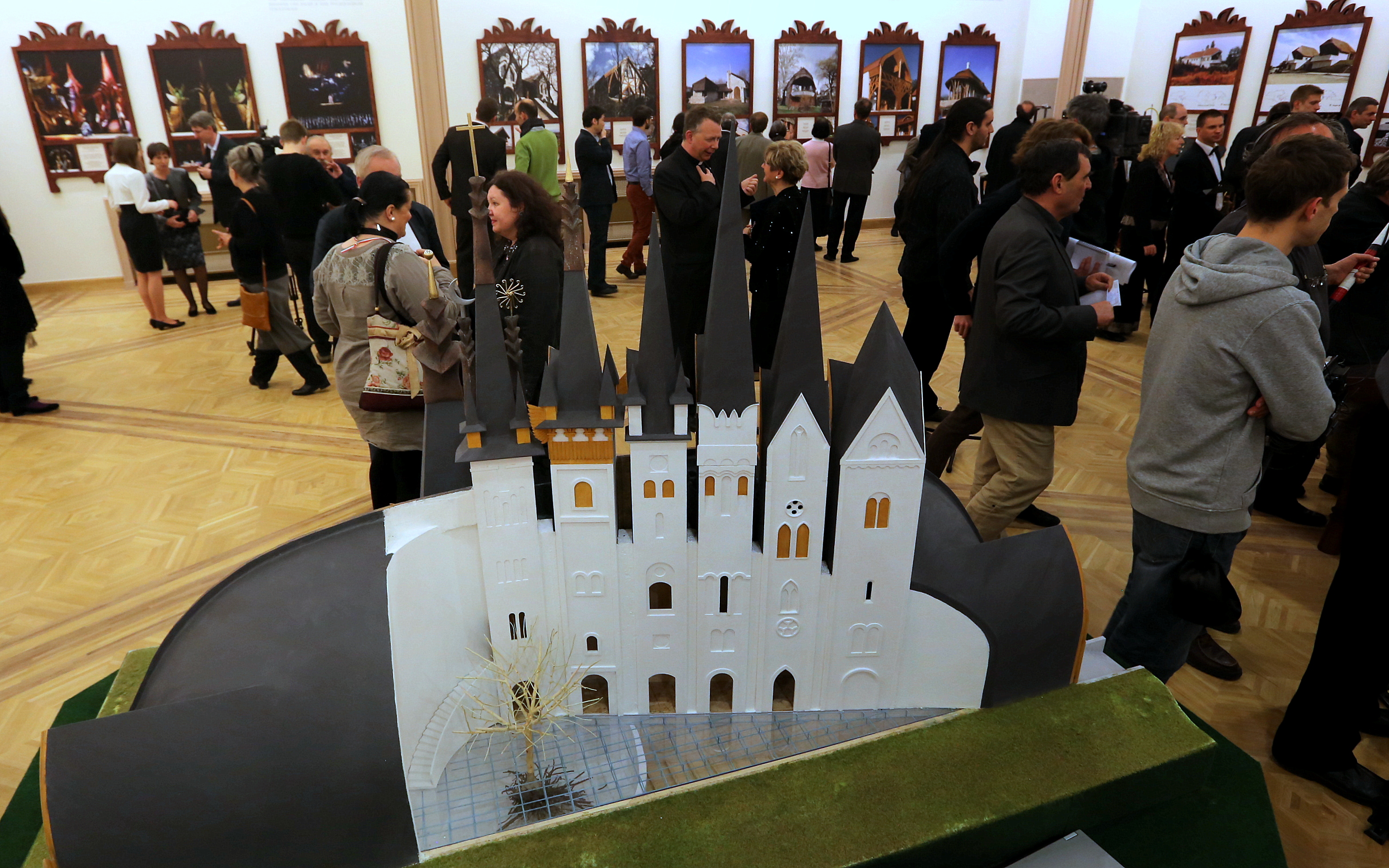 Makovecz Imre kiállításának megnyitóján a Pesti Vigadóban, 2014. 03.16.